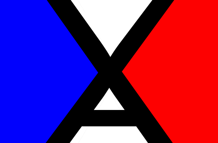 Emblema del Frente de Acción Popular, usado también como bandera del mismo. Basado en dibujos aparecidos en revista Topaze.